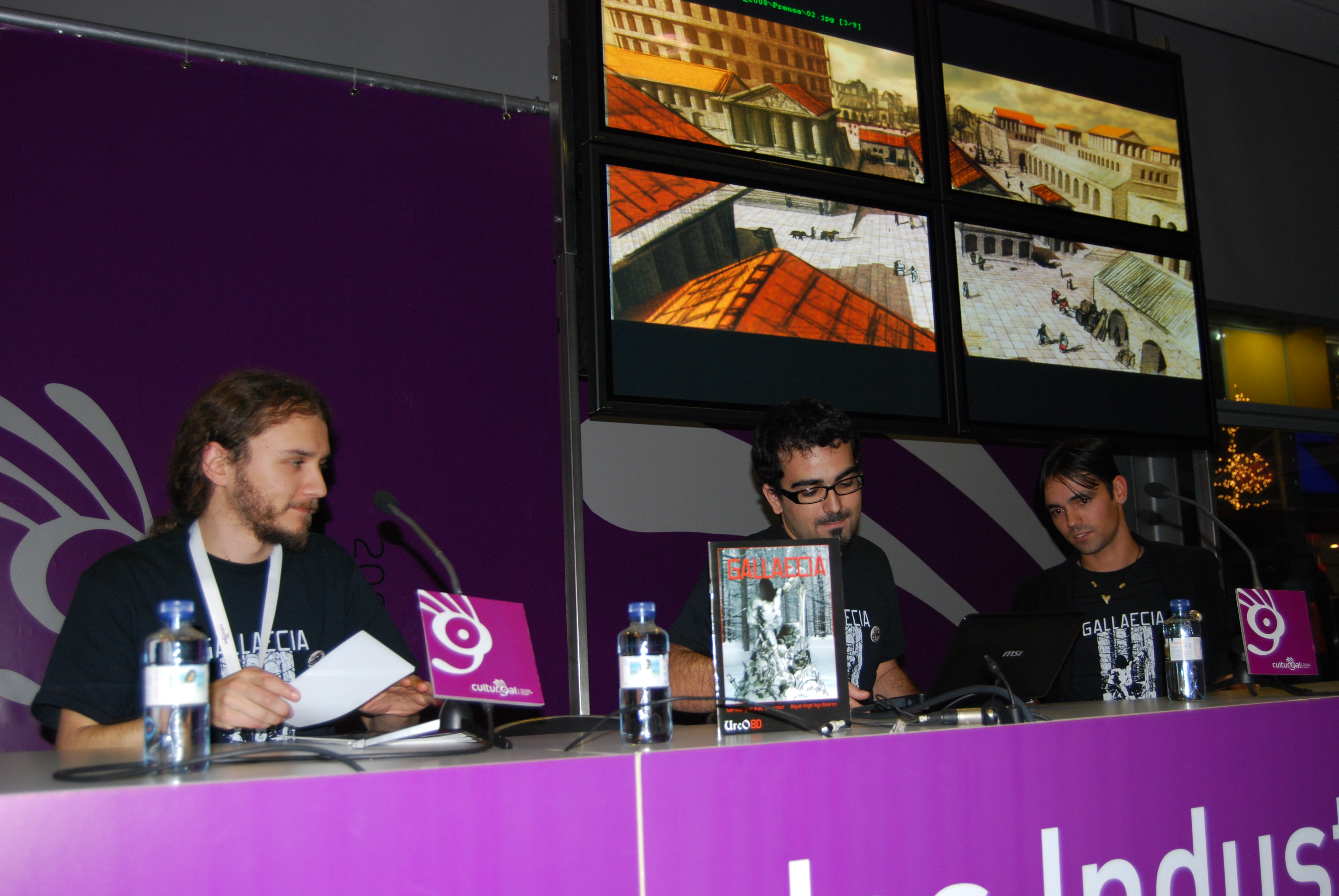 A editorial Urco Editora presentando o libro Gallaecia.